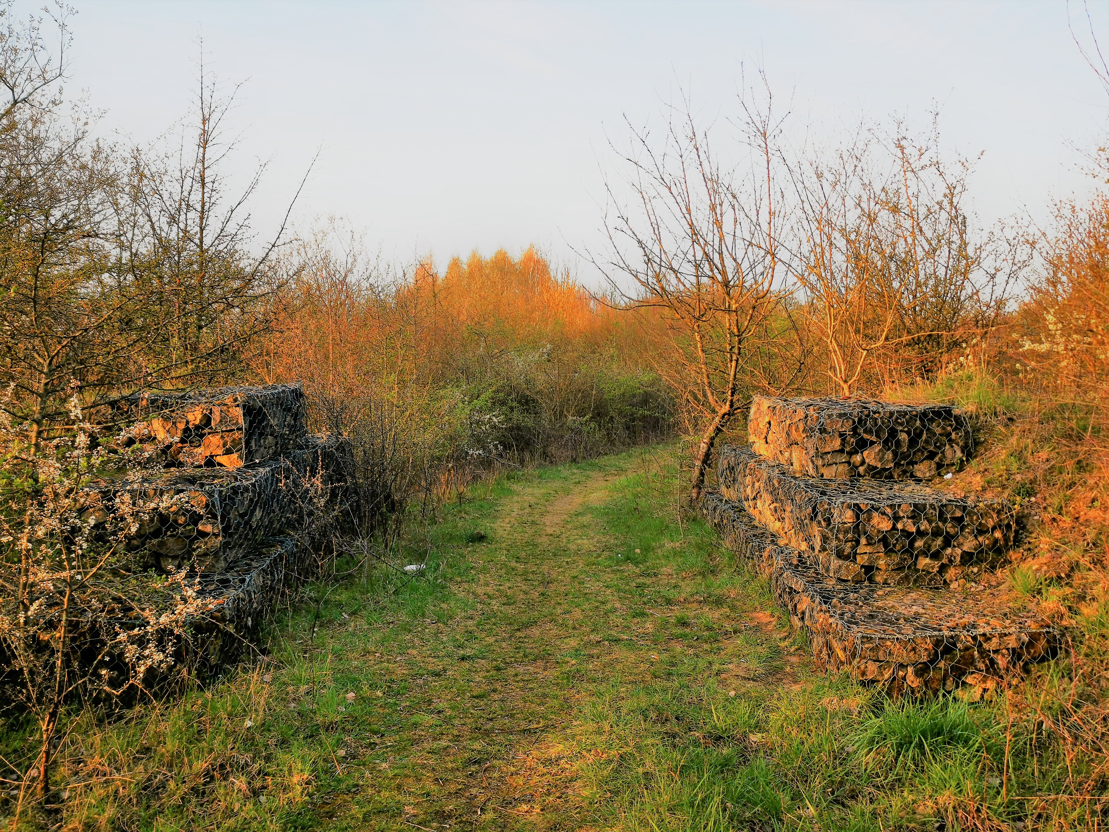 Luxembourg. Sentier dans le parc "Hiwwelpark" à Gasperich.